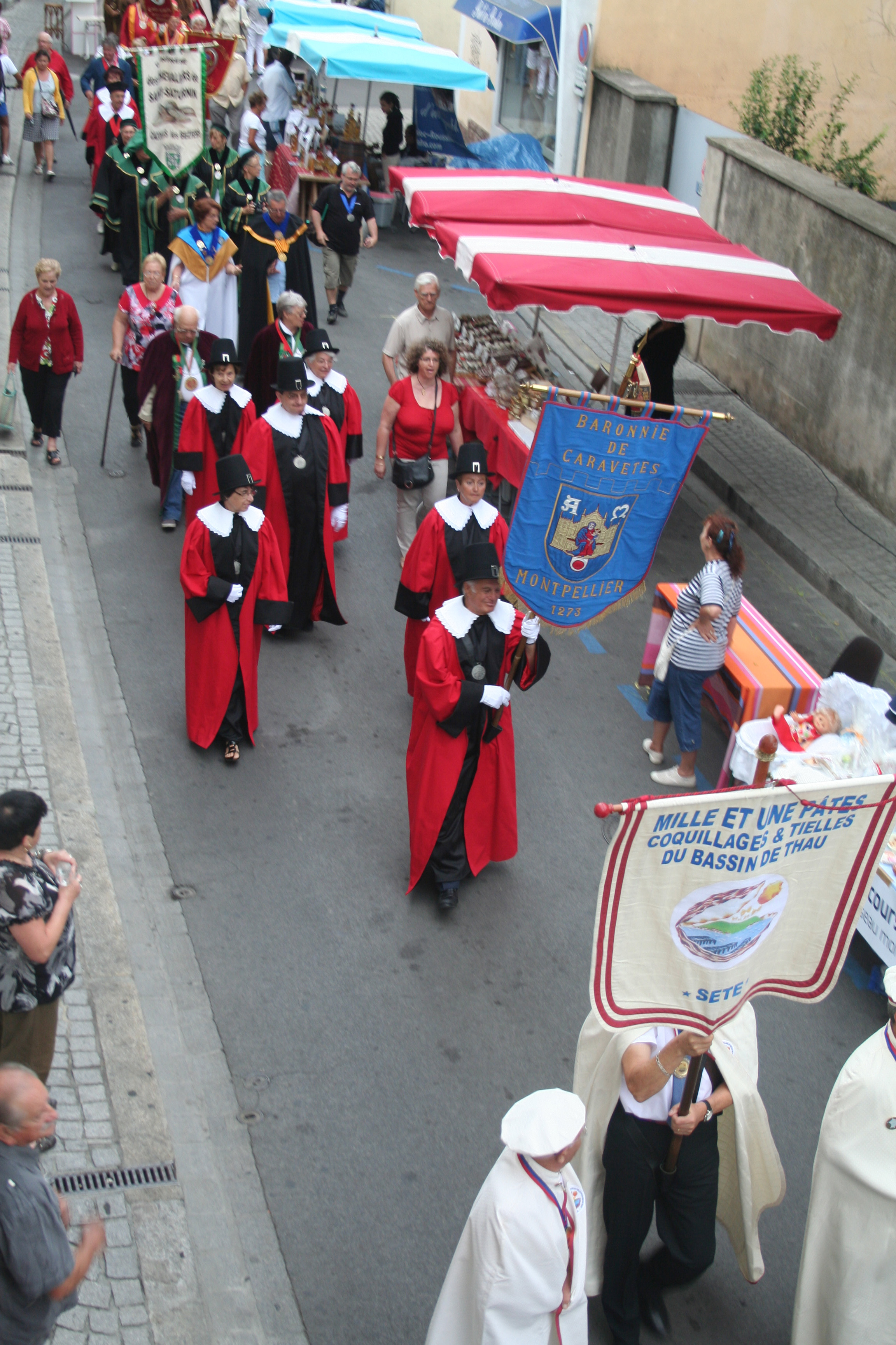 Frontignan (Hérault) - fête du muscat 2011 - barons de Caravètes, confrérie montpelliéraine.